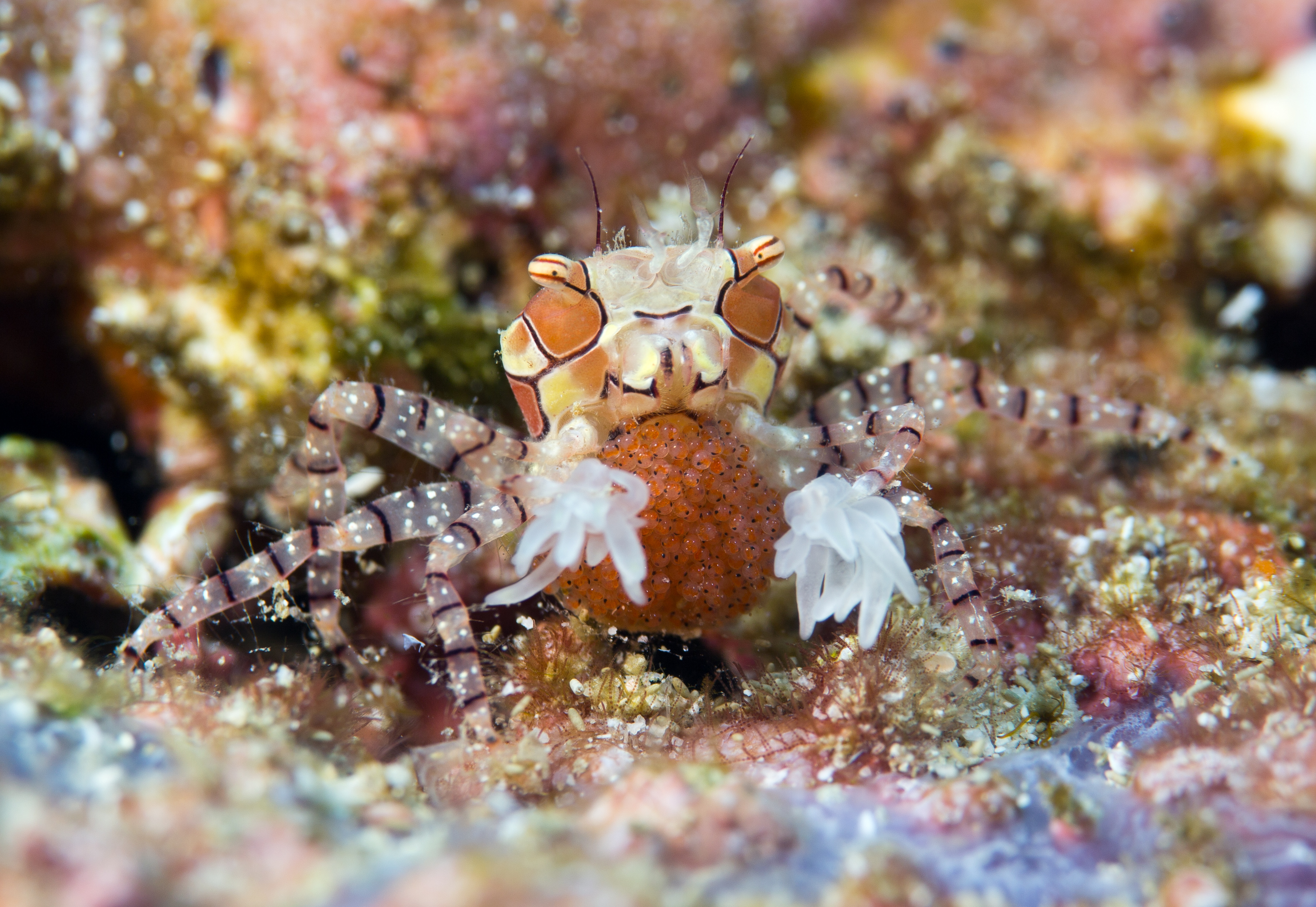 Boxer Crab carrying eggs - Lybia tessellata